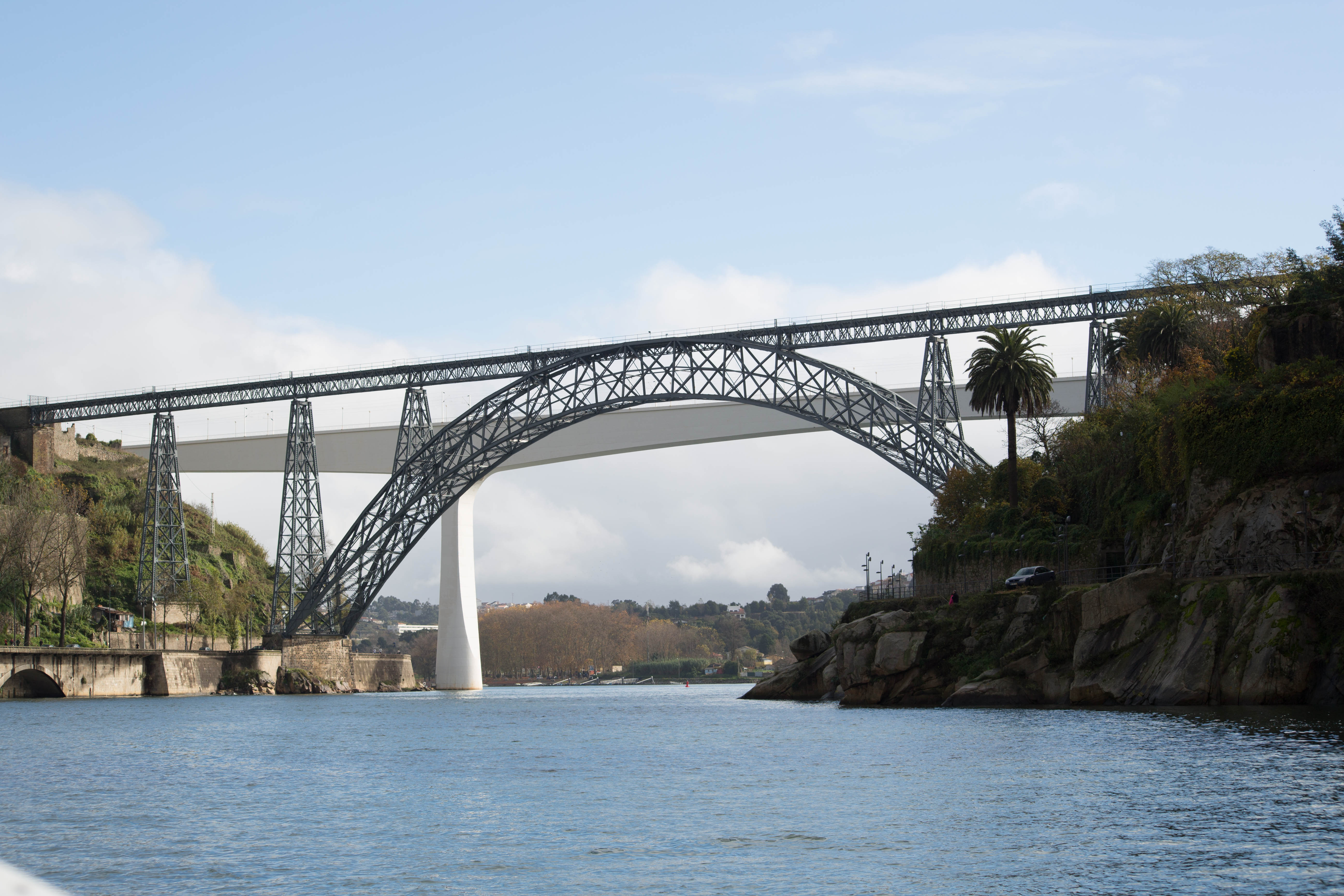 F29A5425